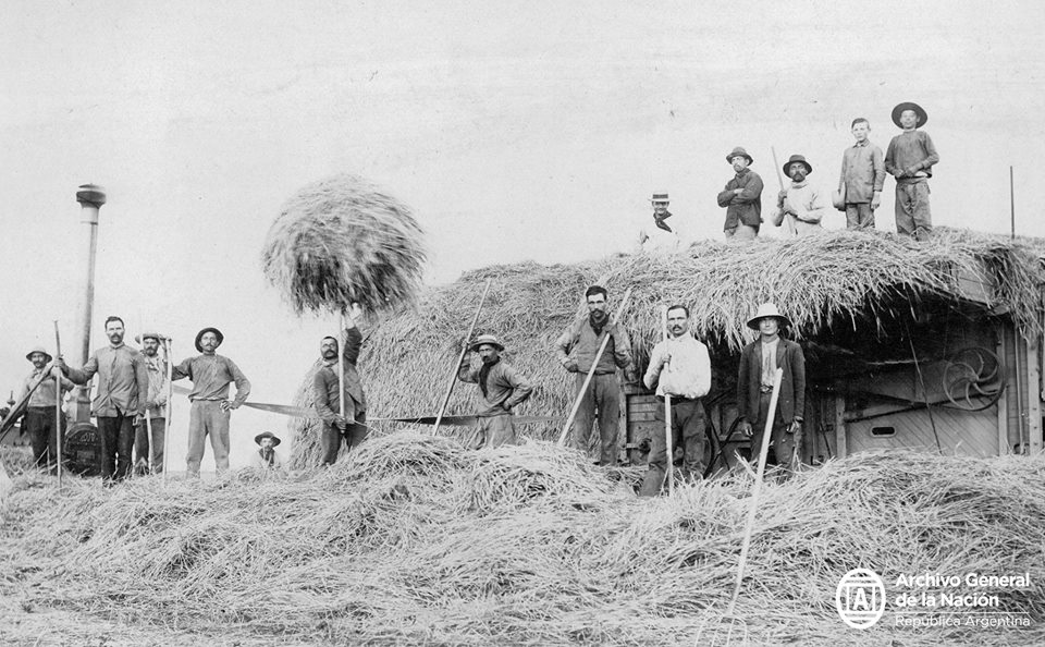 Campesinos de Moisesville, provincia de Santa Fe, pionera de las colonias judías, fundada en 1889. AGN_DDF/ Inventario 256176.